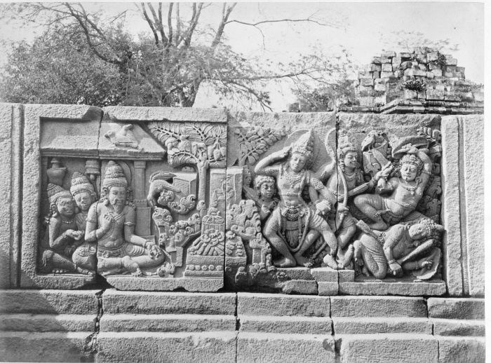 Foto. Reliëfs op de Candi Lara Jonggrang oftewel het Prambanan tempelcomplex